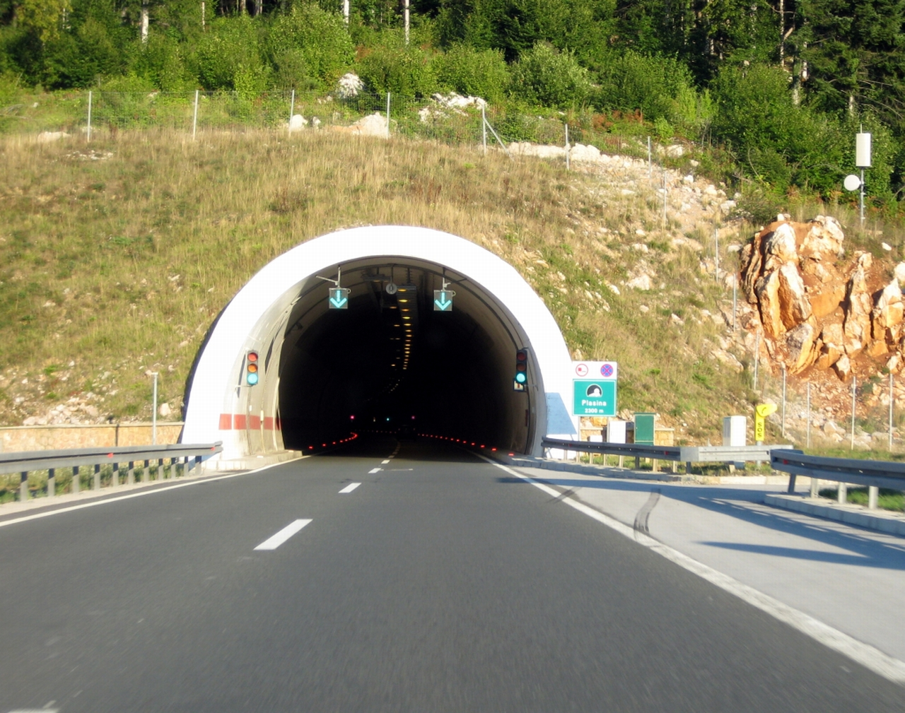 Tunel Plasina, Autocesta_A1.